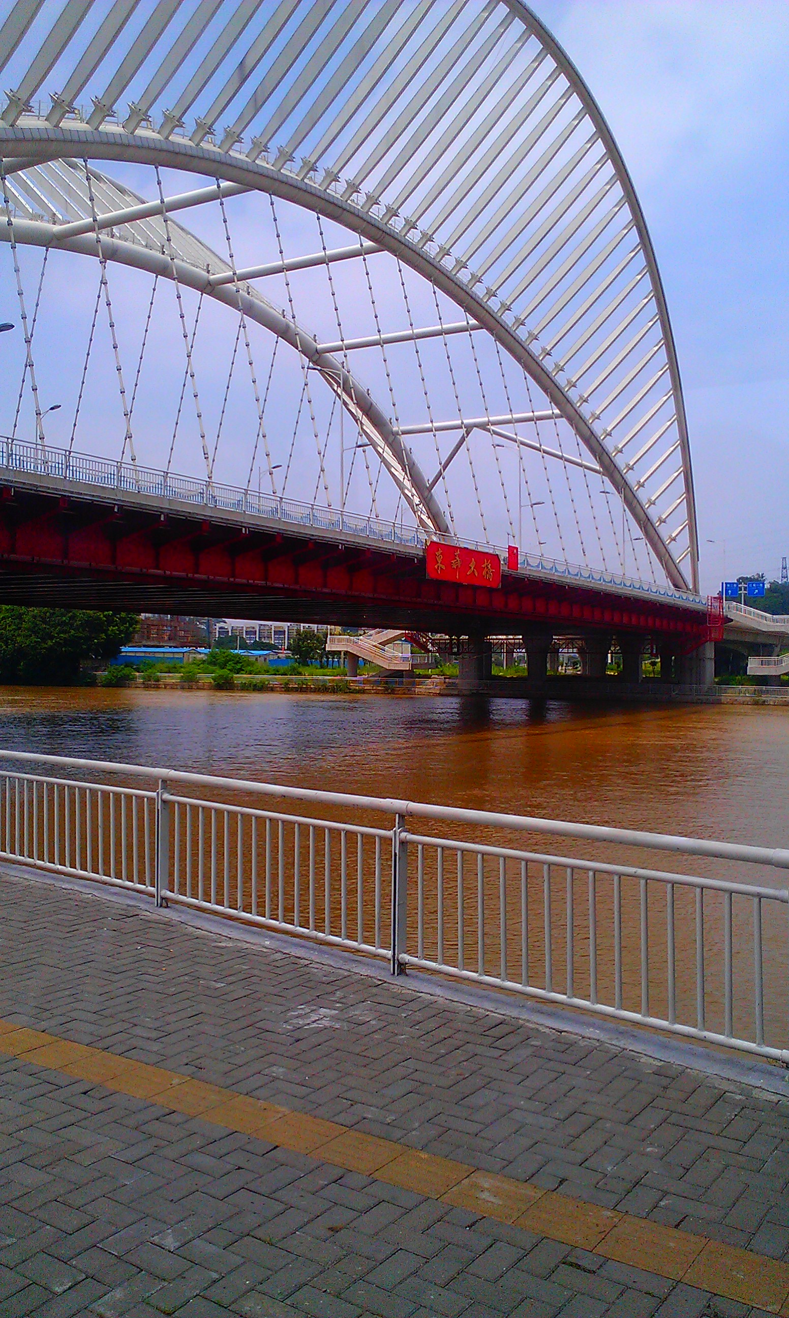 中文（香港）: 江門市東華大橋，2012年落成。